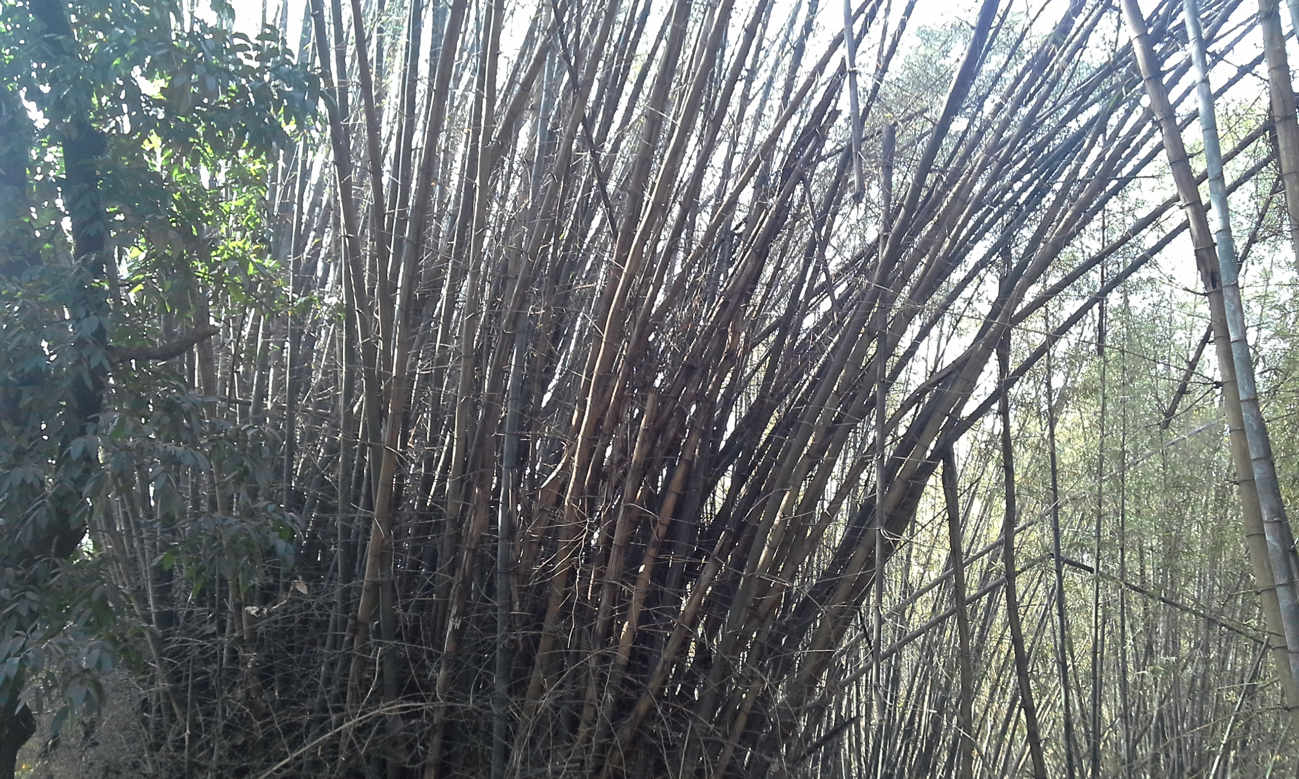 बंगलोरमधील कब्बन पार्क येथील बांबू वन